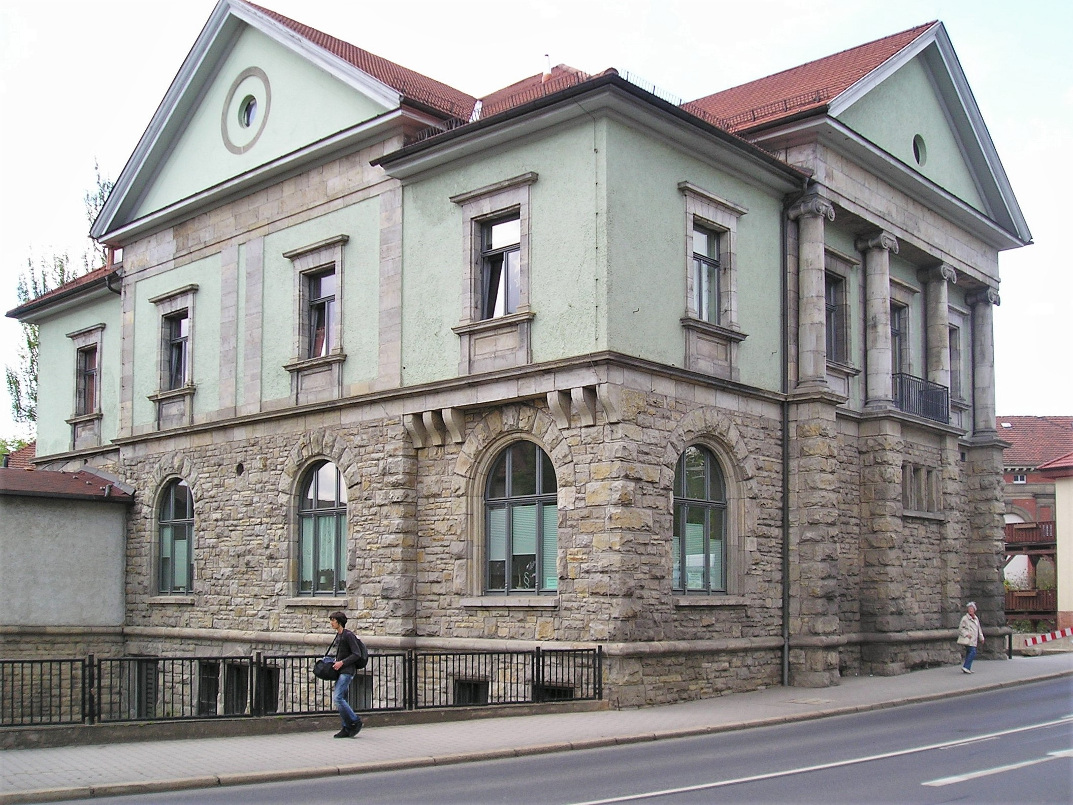 Ehemaliges Logenhaus der Freimaurerloge „Charlotte zu den drei Nelken“ in Meiningen